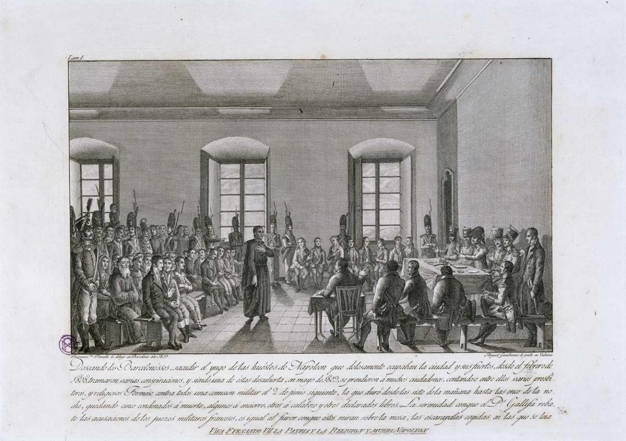 Conspiración contra los franceses en Barcelona 1809, gravure de Miguel Gamborino d'après un dessin de Buenaventura Planella. ca. 1815. Eau-forte et burin. Bibliothèque nationale d'Espagne.